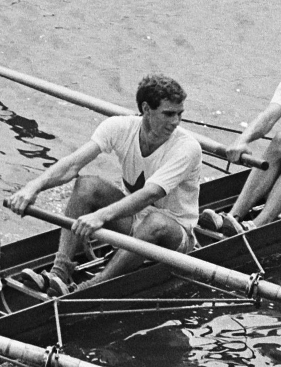 Finales Nationale Roeiwedstrijden op Bosbaan, Amsterdam: D. B. Tuinzing